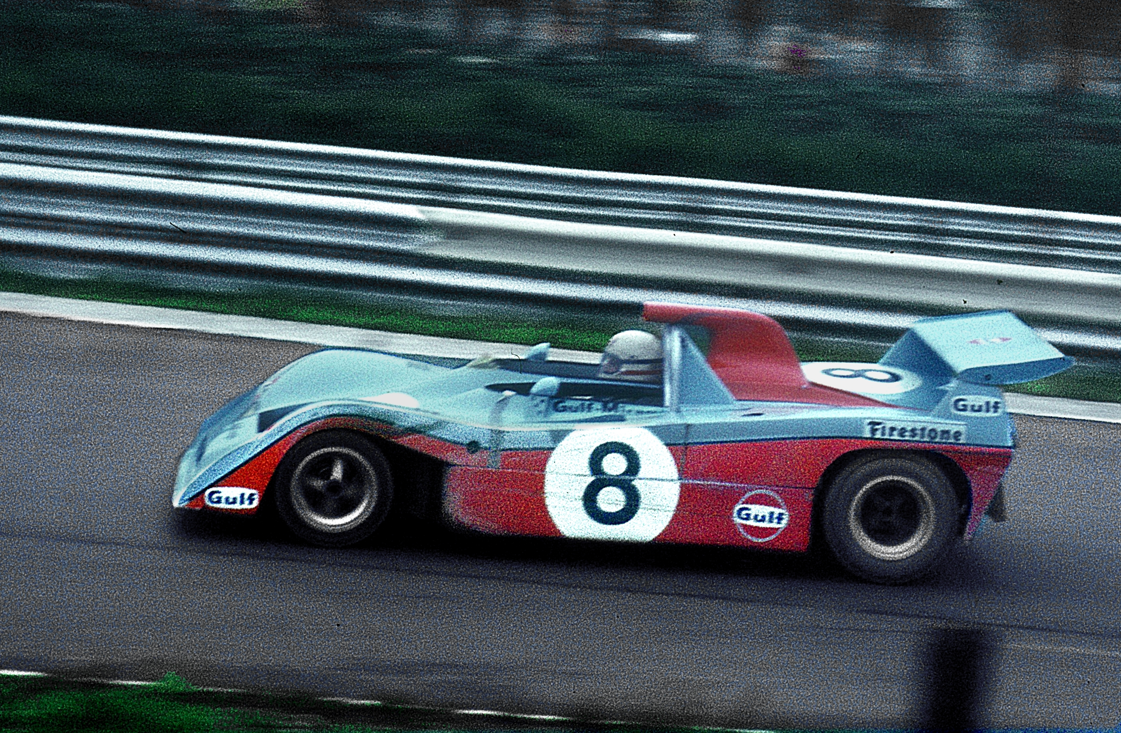 Derek Bell im Mirage M6 eingangs Südkehre